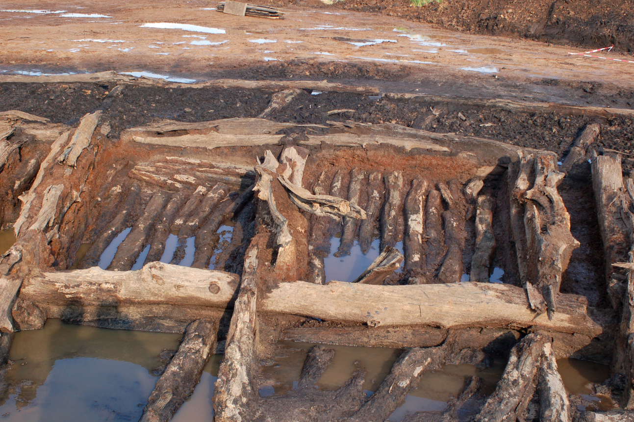 Freigelegte Holzfächer des Burgringes des Heidenwall (Oldenburg)